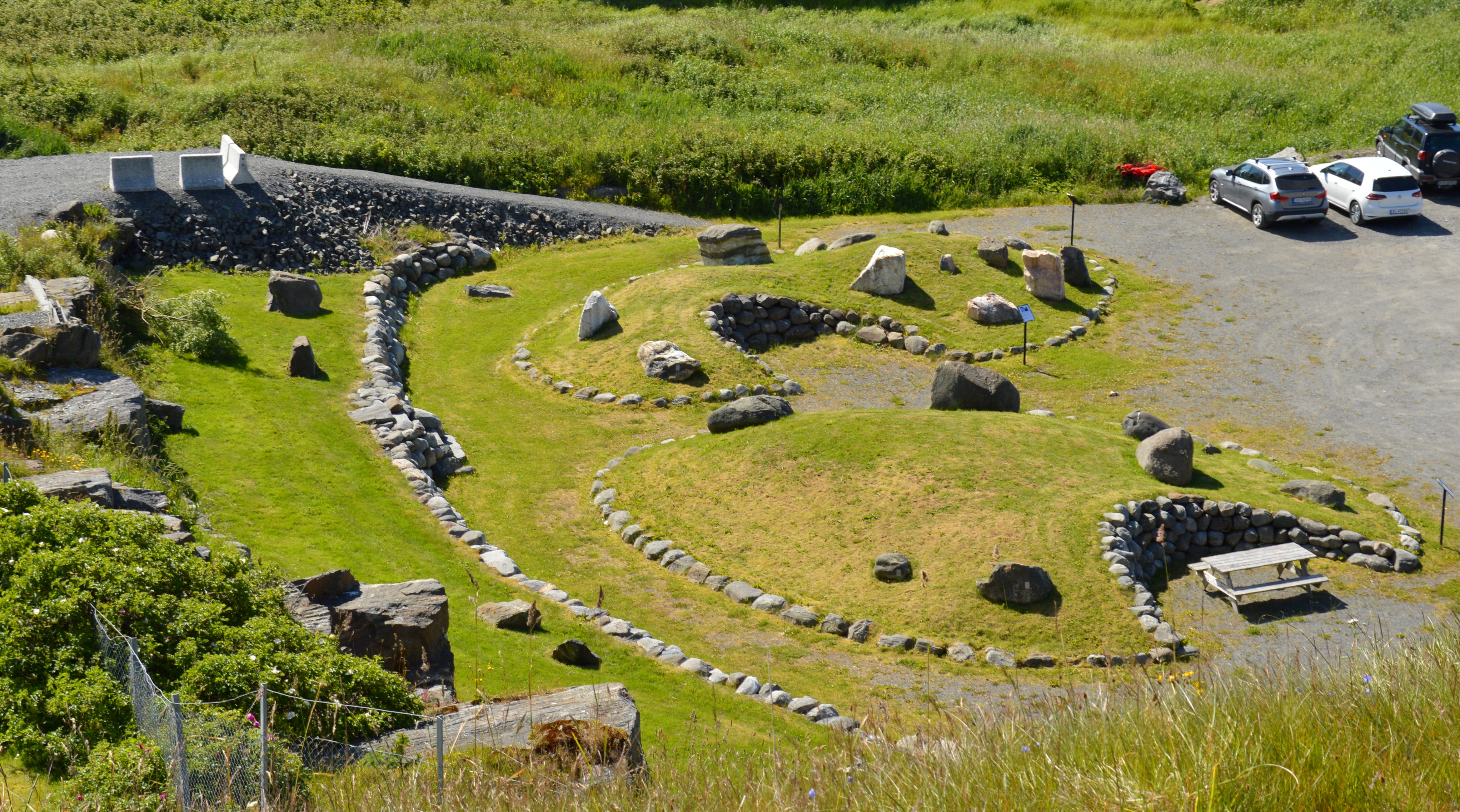 Steinpark bei Bud